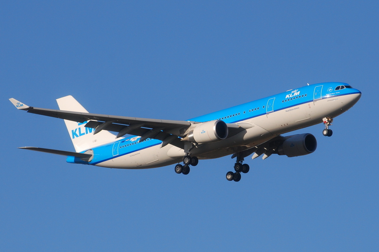 Photo prise à l'aéroport de Toulouse-Blagnac (LFBO) en France. Picture take at Toulouse-Blagnac Airport (LFBO) in France.